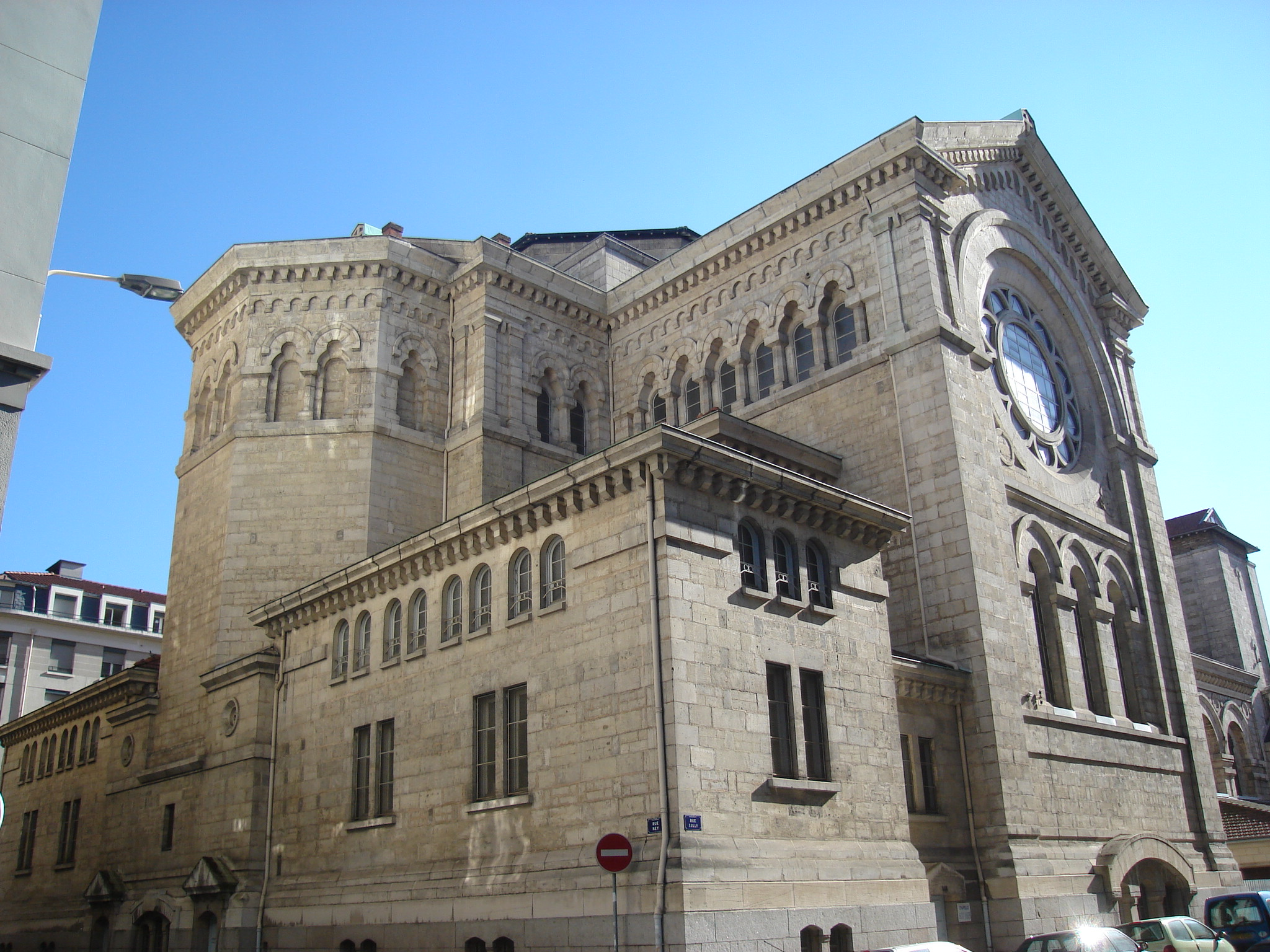 Église Saint-Joseph, angle rue Ney et rue Sully, Lyon 6e (Brotteaux)